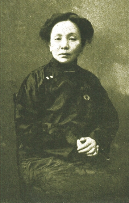 金韵梅大夫像